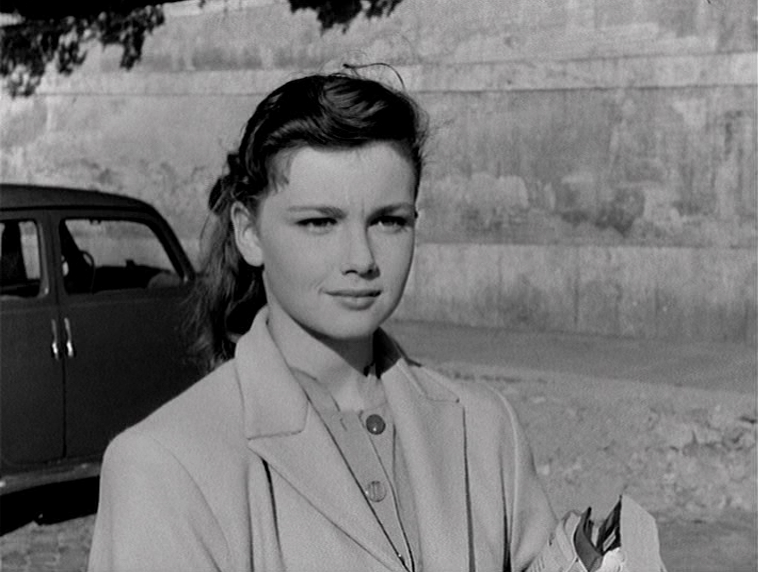 Screenshot del film Il bidone (1955) di Federico Fellini.